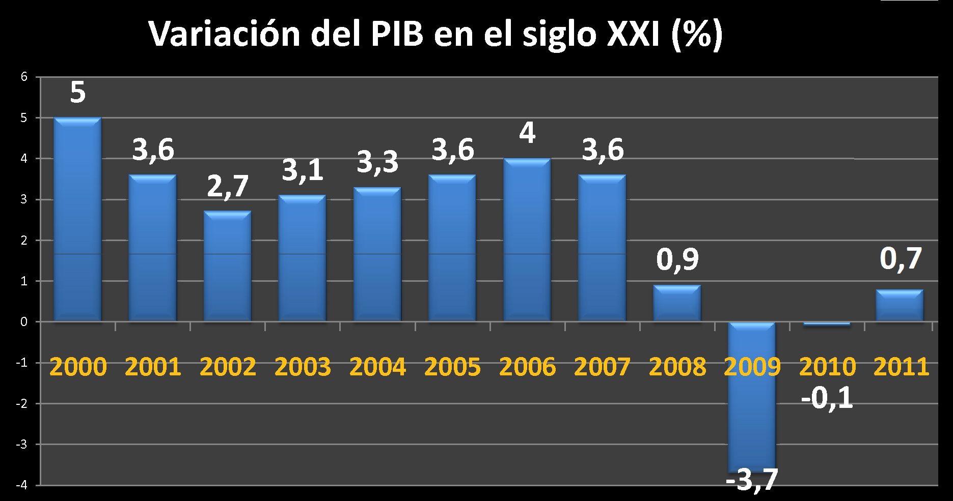 Tasa de crecimiento de la economía española hasta 2012